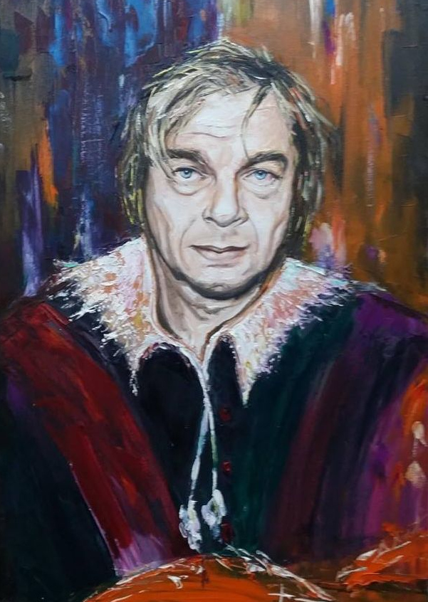 Nichita Stanescu, portret realizat de Paul Mecet